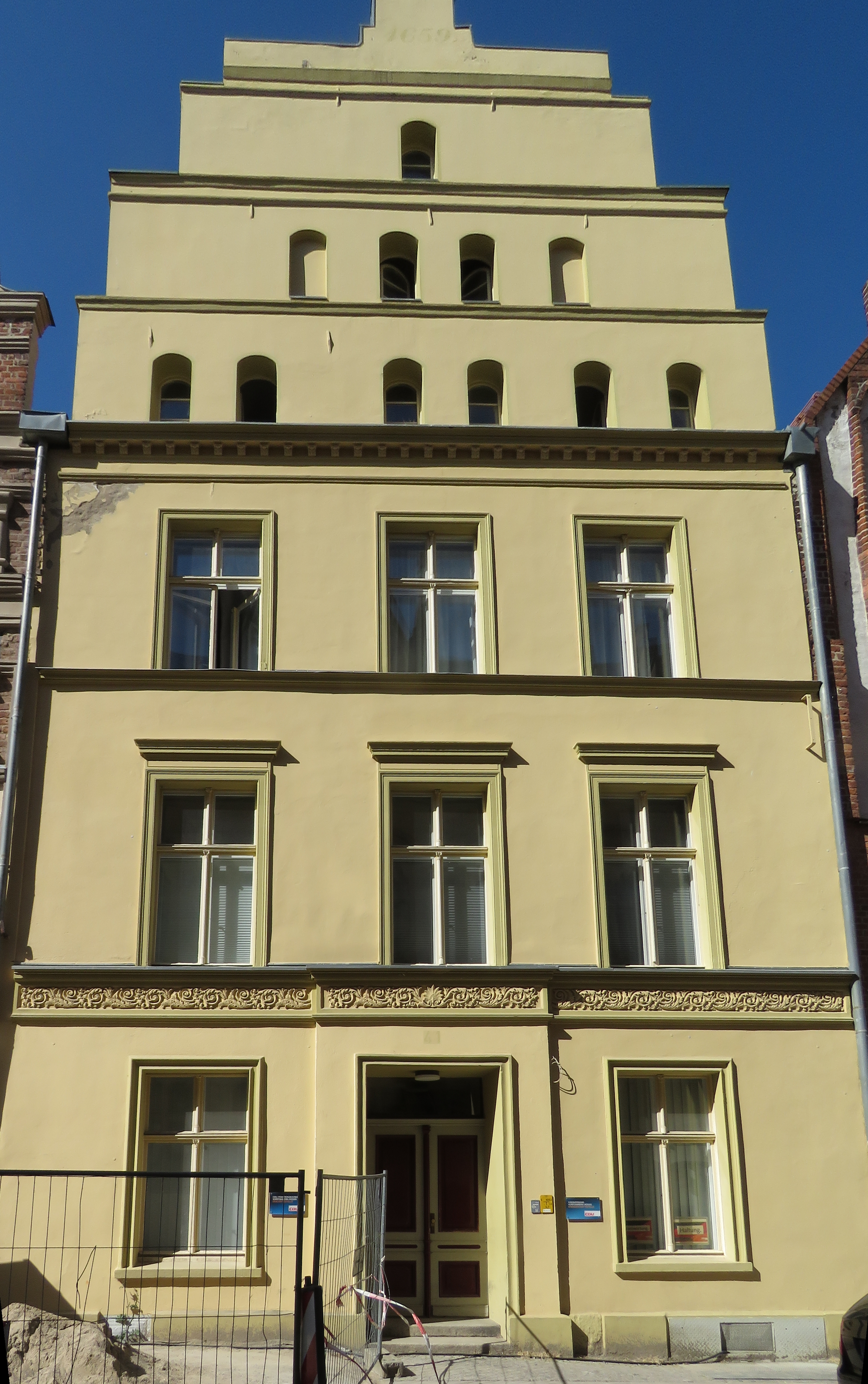 Ansicht Haus Badenstr. 41 in Stralsund